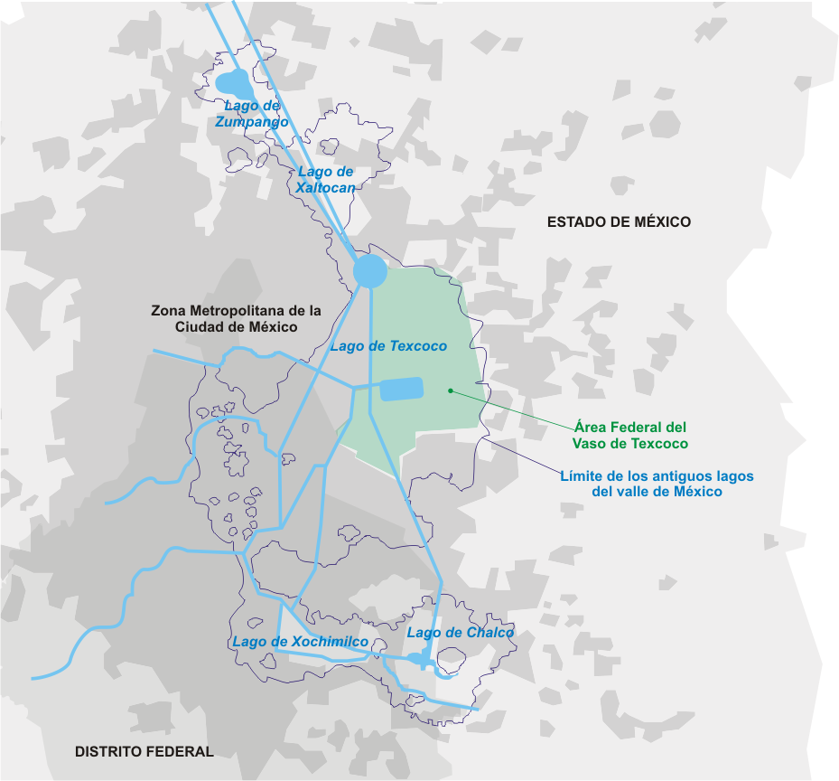 Mapa comparativo de la superficie del lago de Texcoco y la ciudad de México